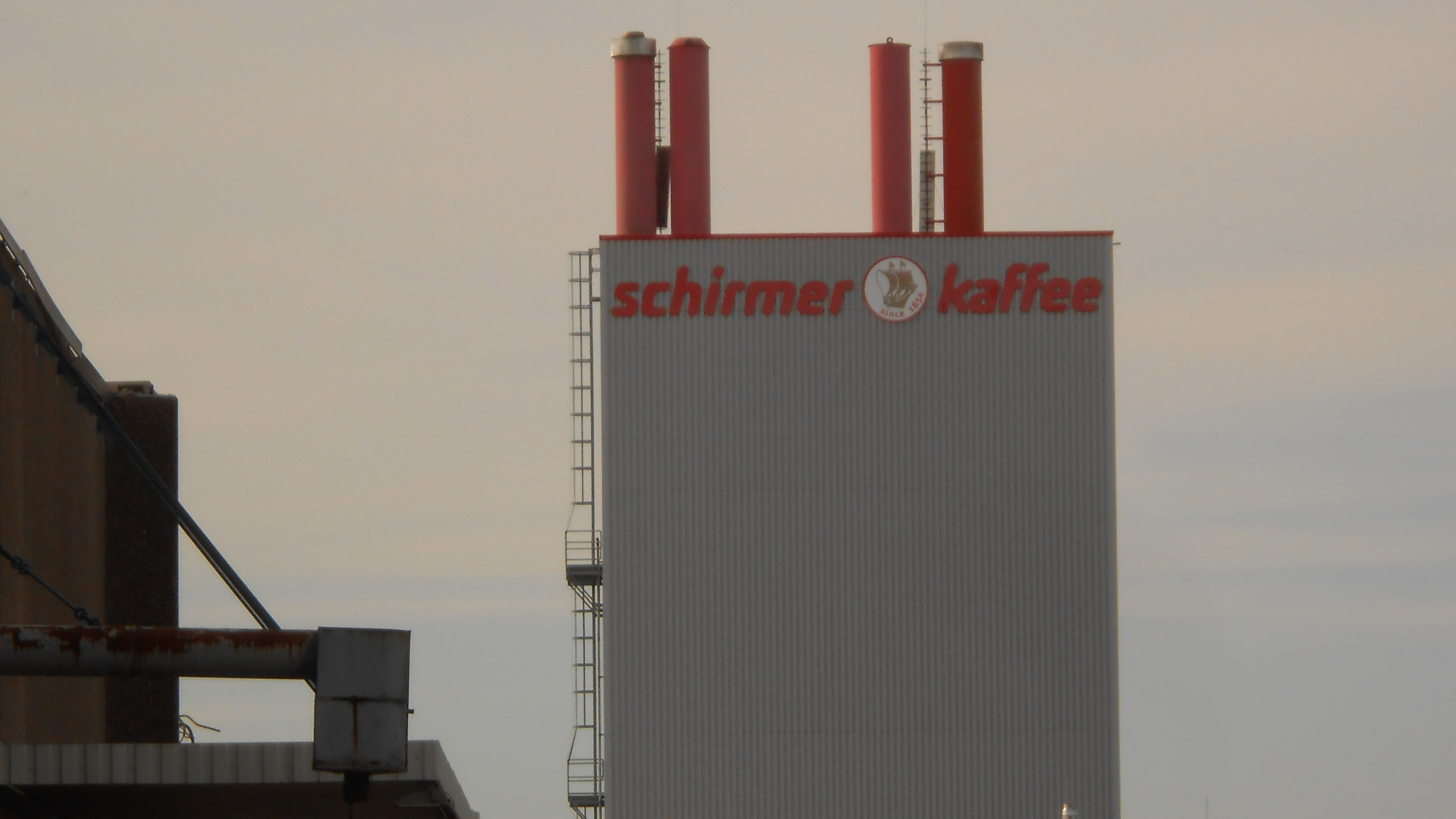 Auf dem Fabrikgelände von Schirmer Kaffee im Gewerbegebiet Heßlingsweg (Nr. 28), in Dortmund-Brackel.